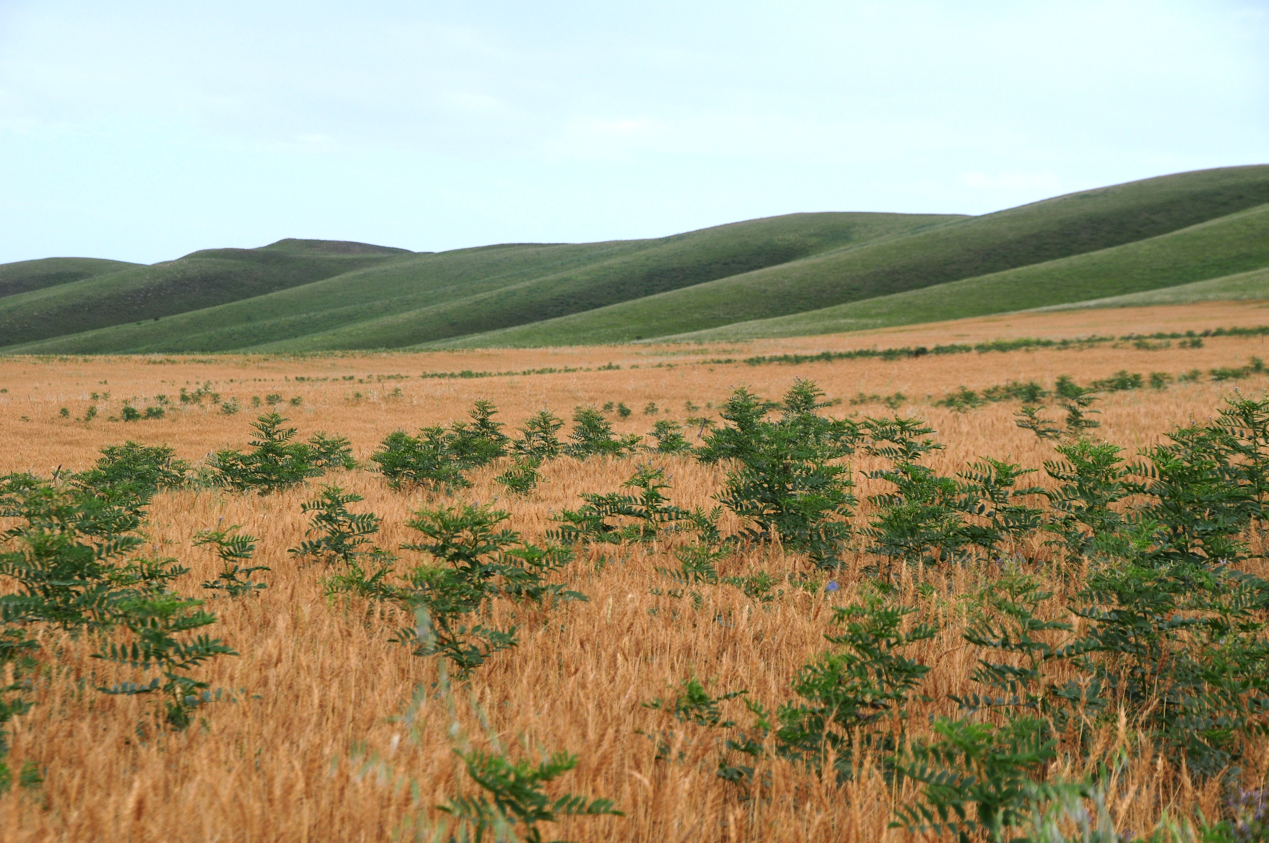 17785 Vashlovani